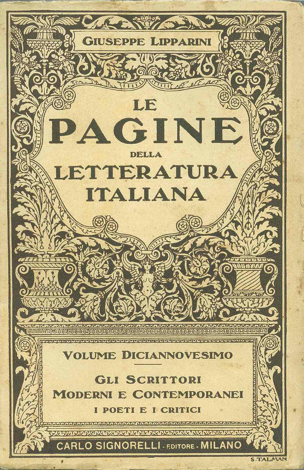 Le Pagine della letteratura italiana di Giuseppe Lipparini, ed. C. Signorelli (Milano) 1925. Collezione Francesco Paolo Frontini